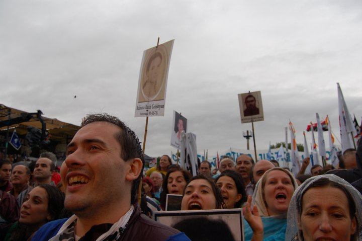 Acto de recuperación del terreno donde función el Centro Clandestino de Detención (CCD) de La Perla, Córdoba.